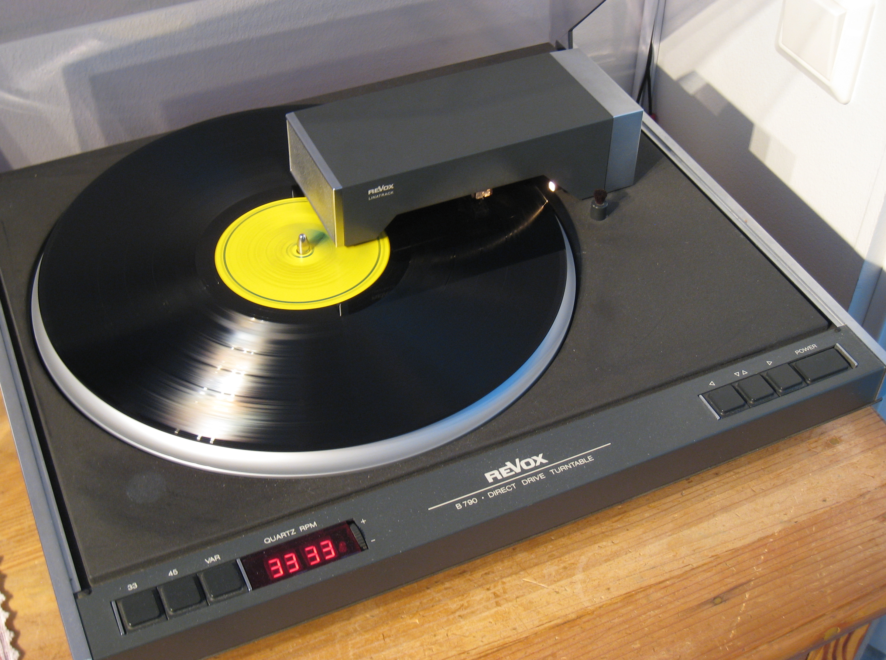 Revox audio equipment